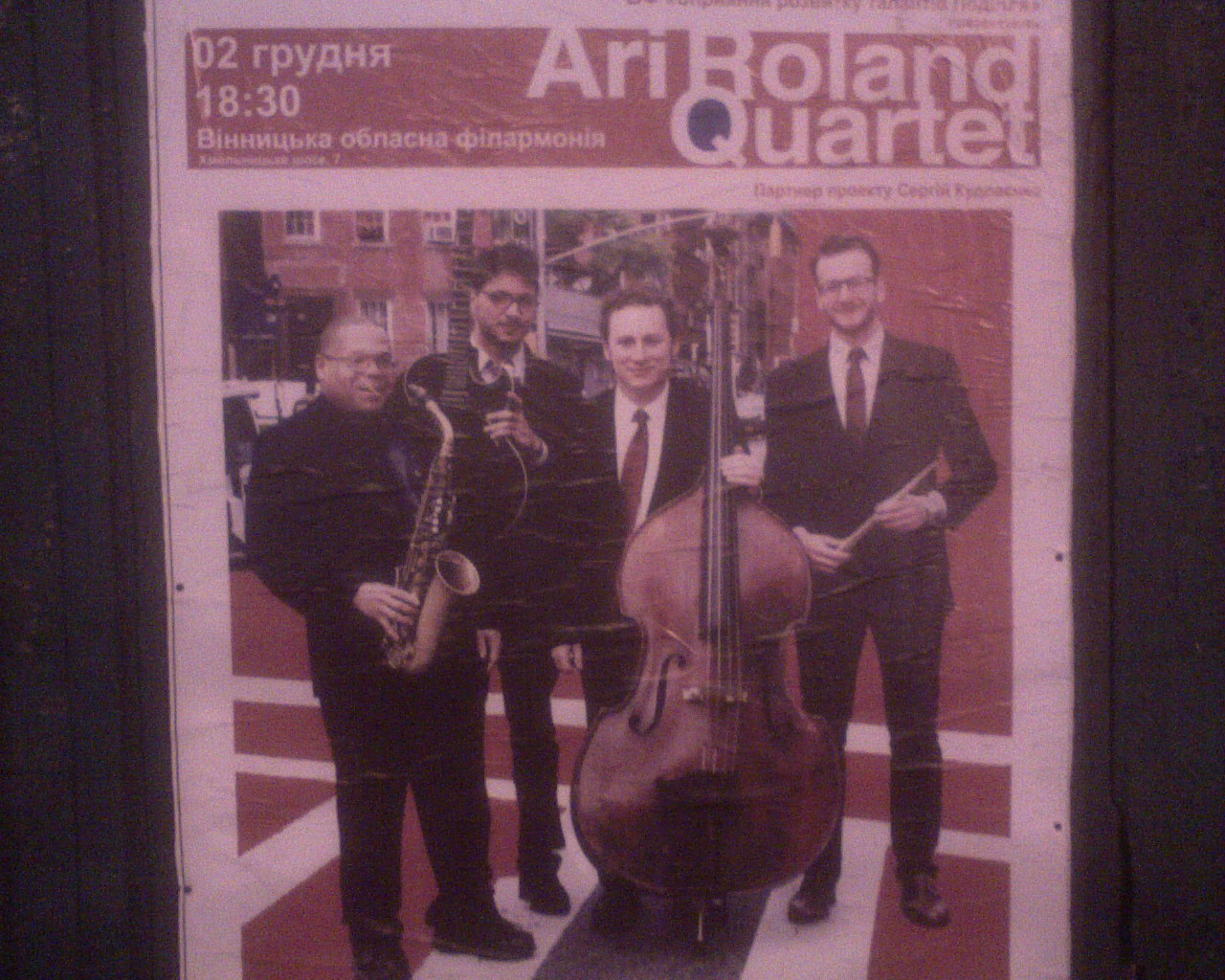 Квартет Арі Роланда у Вінниці, плакат